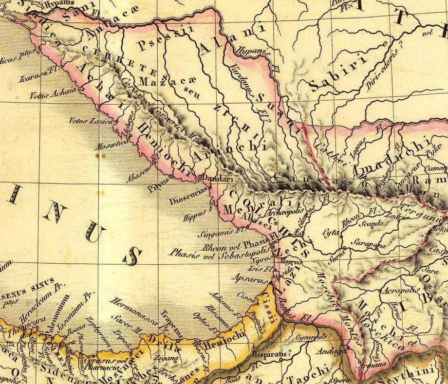 Carte generale de l'Asie-Mineure, de l'Armenie, de la Syrie, de la Mesopotamie, du Caucase &a. par A. Brue, Geographe du Roi. (with) Etat de l'Asie avant Cyrus et limites de l'Empire des Perses a la mort de ce Prince (560 et 579 av. J.C.). (with) Marche de Cyrus le Jeune et des Grecs ses allies, retraite des dix-mille Grecs sous Xenophon. (with) Colonies de Pheniciens de 20e . au 5e. siecles avant J.C. Revue, completee et augmentee de cartes particulieres par Ch. Picquet , Geographe du Roi et de Mgr. le Duc d'Orleans. Paris, 1839. Chez Chles. Picquet, Quai Conti No. 17, pres du Pont des Arts.